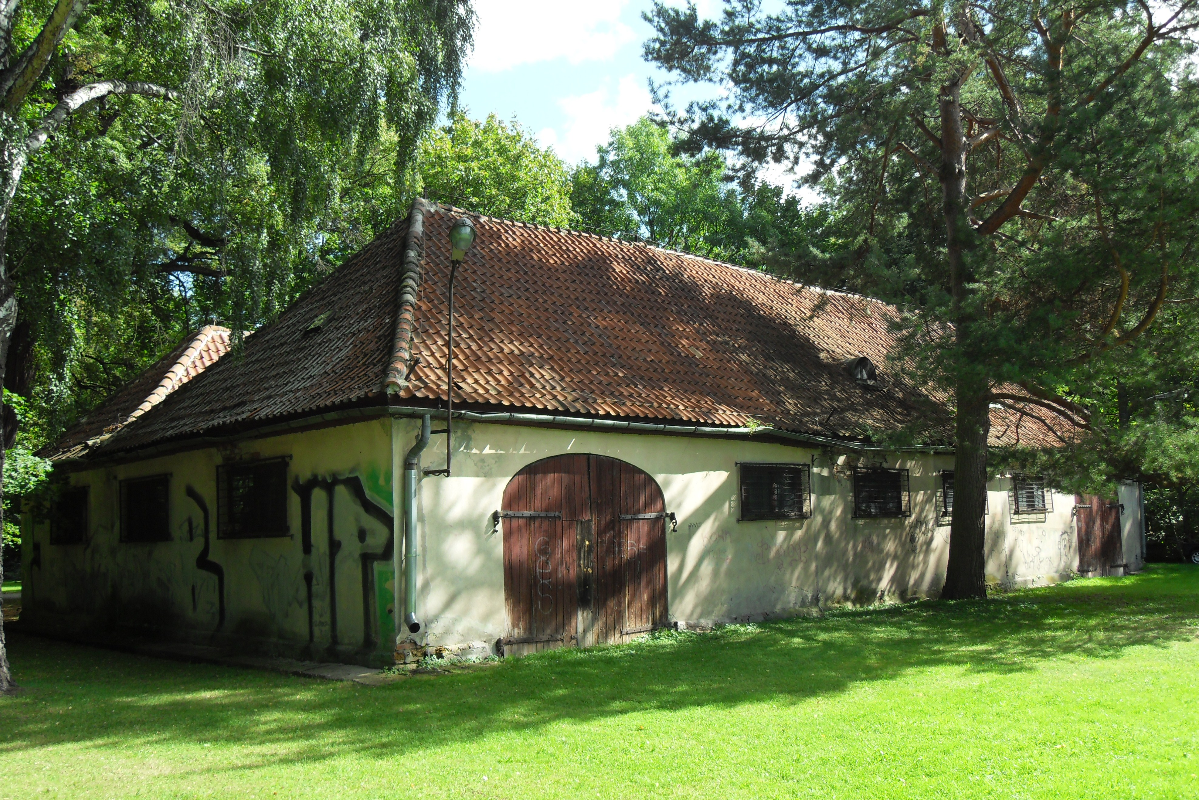 Park Oliwski, zabytkowa wozownia.